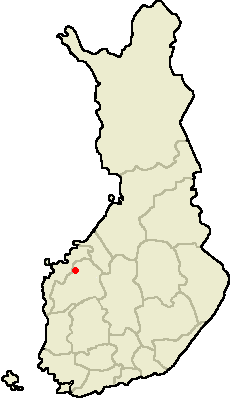 Own work